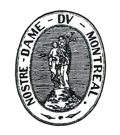 Sceau armorié de la Société de Notre-Dame de Montréal.